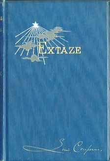 Extaze een boek van geluk